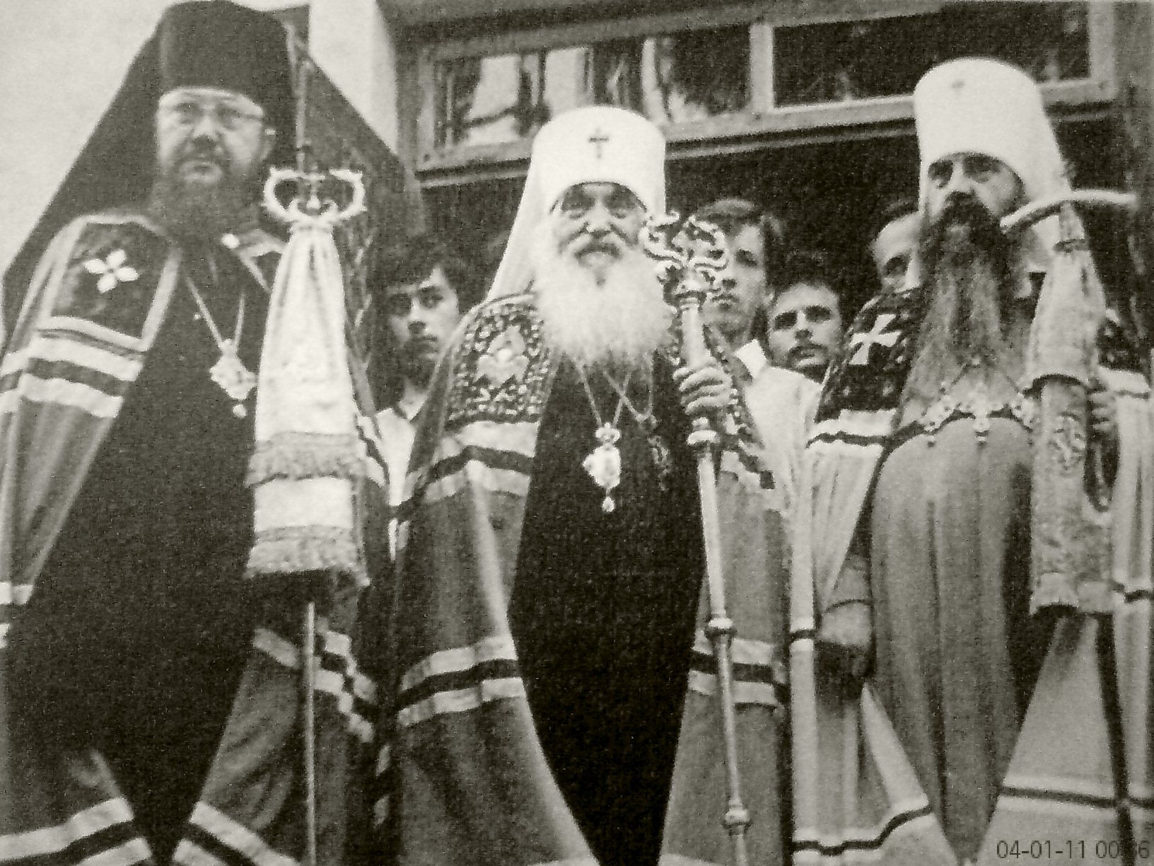 Arcybiskup Sawa (Hrycuniak), metropolita Bazyli (Doroszkiewicz) i metropolita Filaret (Wachromiejew) w czasie pielgrzymki na Świętą Górę Grabarkę